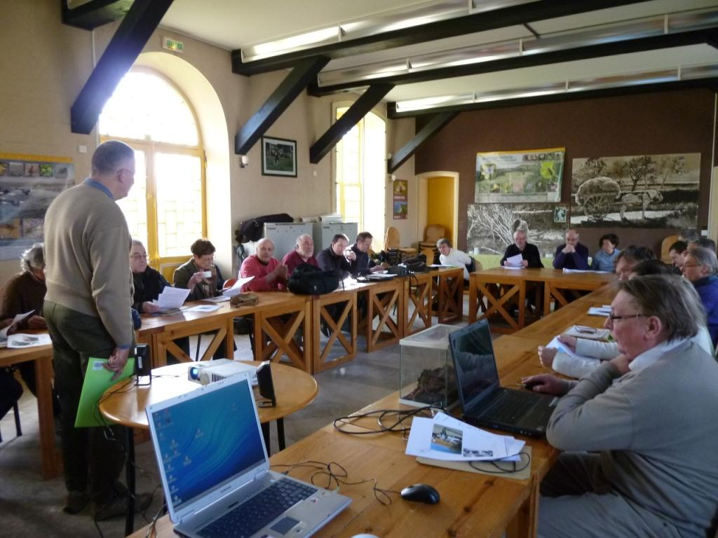 CSENPC CMO